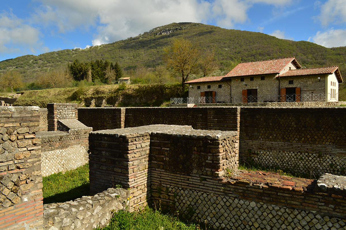 Villa di Traiano